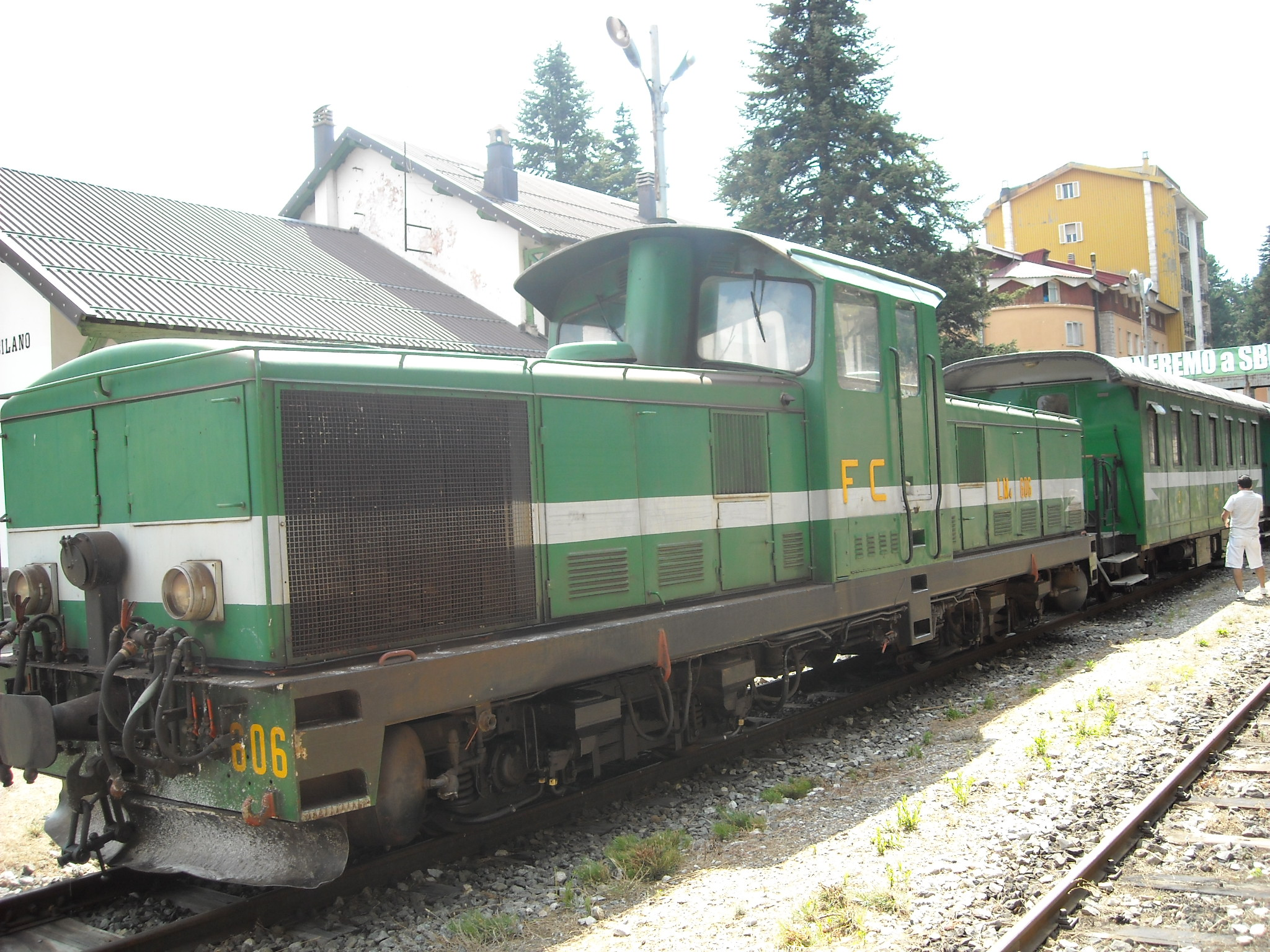 Locomotore LM4 delle Ferrovie della Calabria a Camigliatello Silano